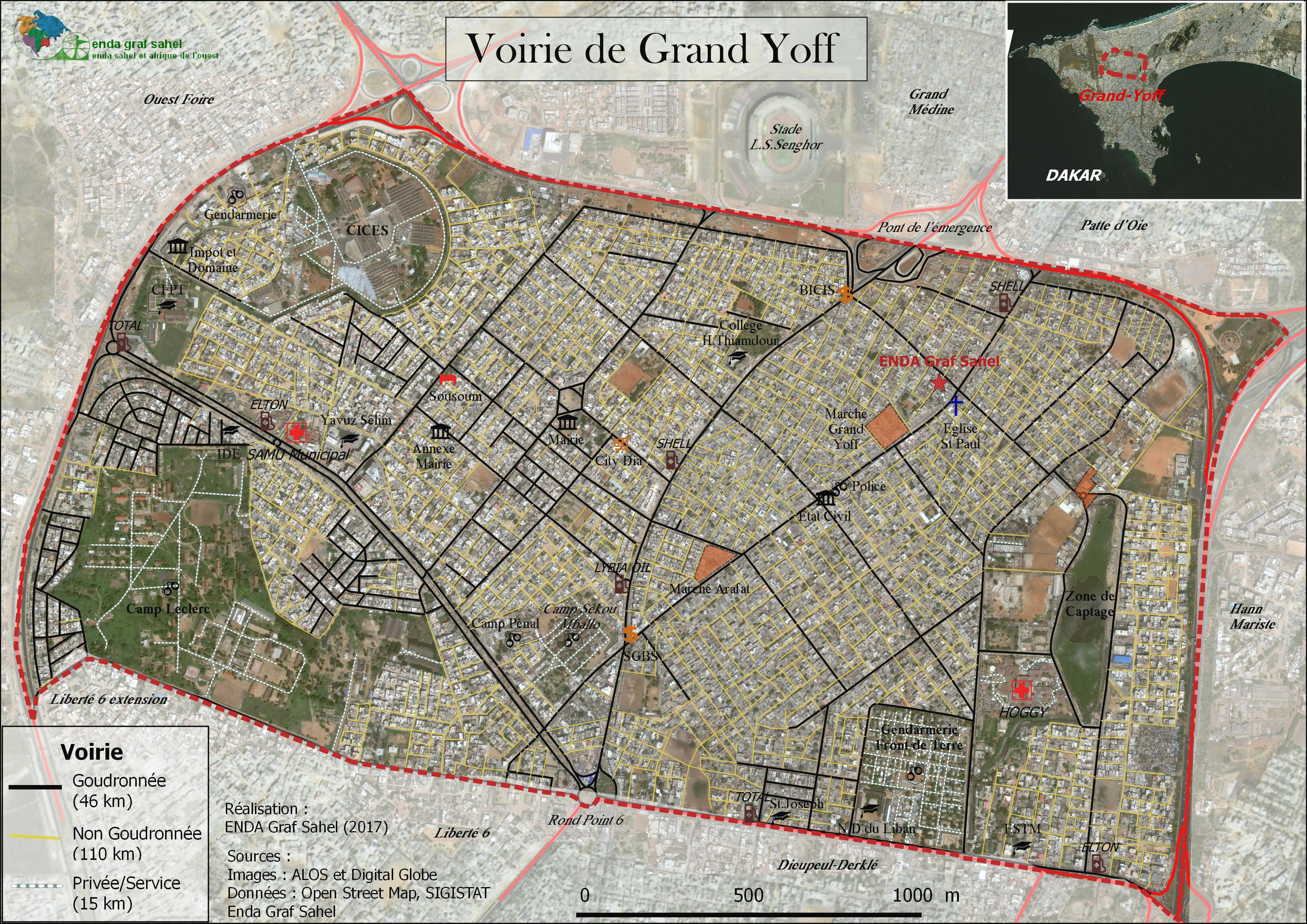 Carte des routes de Grand-Yoff